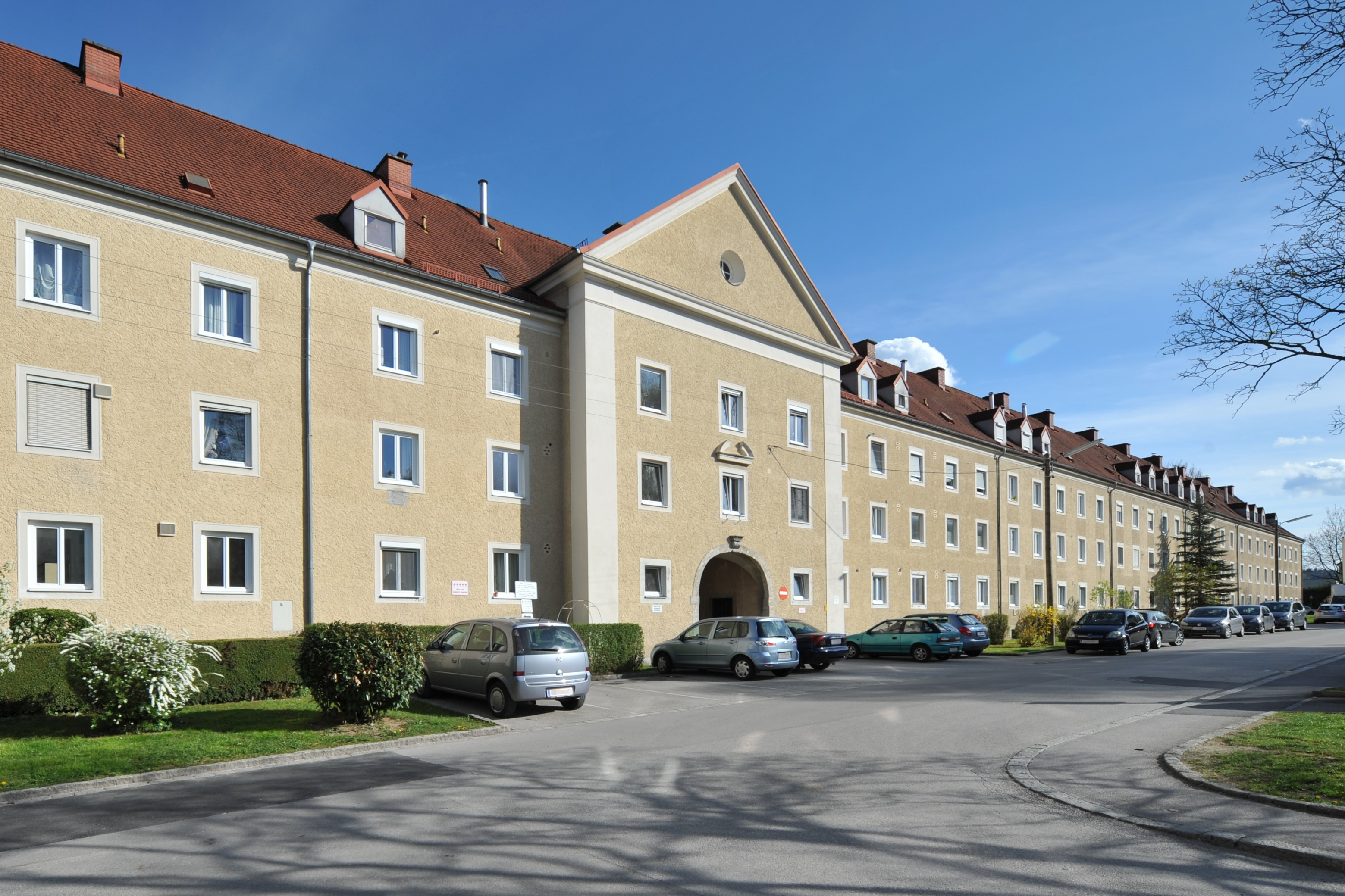 Bachlfeldsiedlung